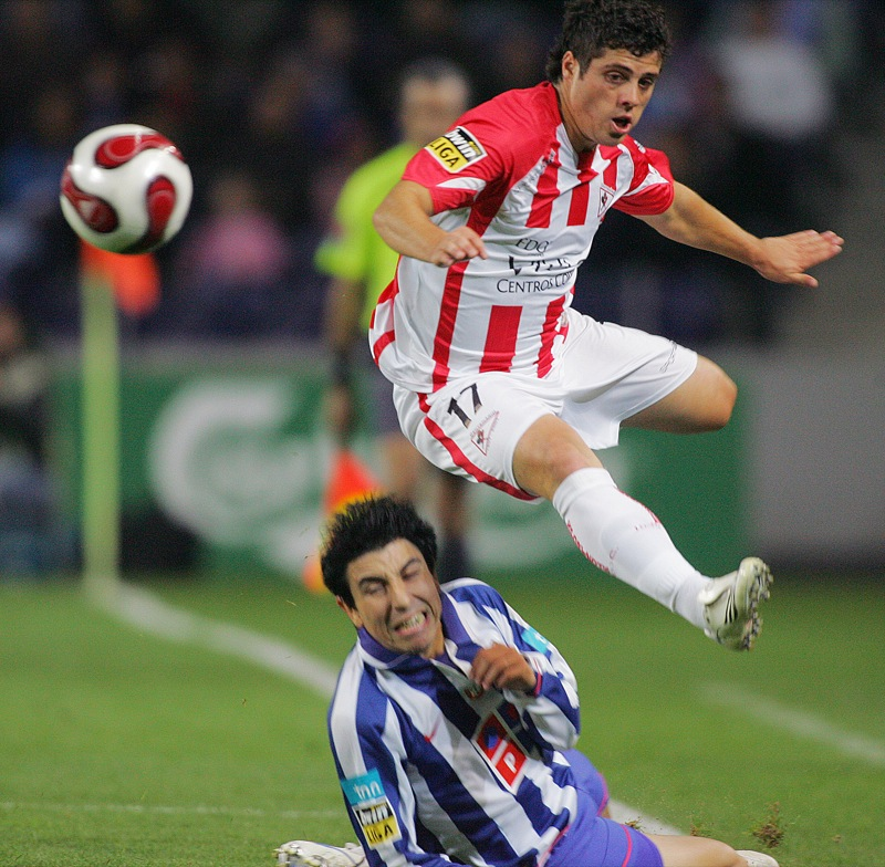 FC Porto - 3 vs Leixoes SC - 0; estádio do Dragão - Porto. 8 jornada Vieirinha (LSC) desenvencilha-se de Fucile (FCP)